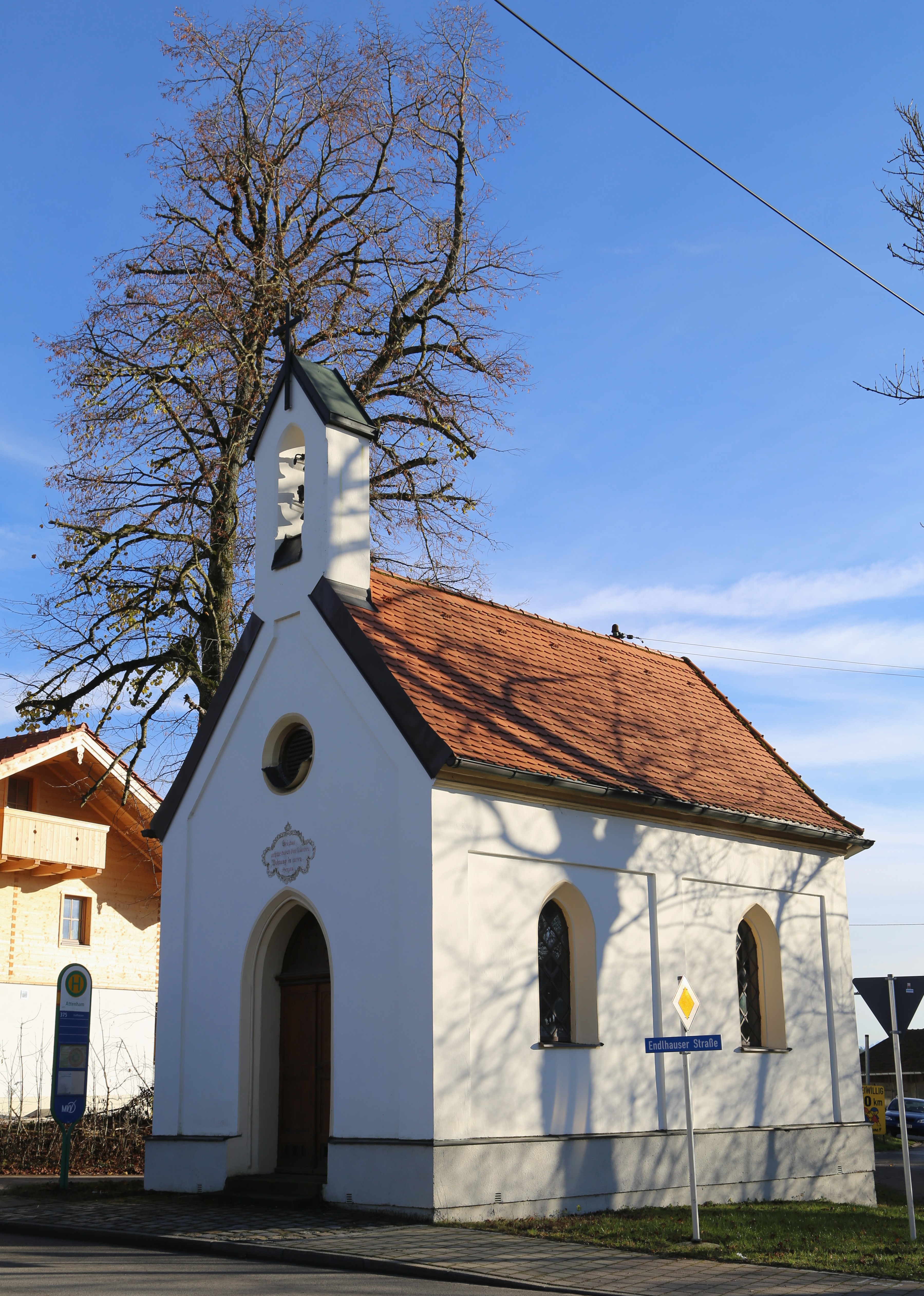 Attenham, Wolfratshauser Straße 6; Ortskapelle St. Florian, neugotischer putzgegliederter Satteldachbau mit Giebelreiter, 1862ff.; mit Ausstattung.